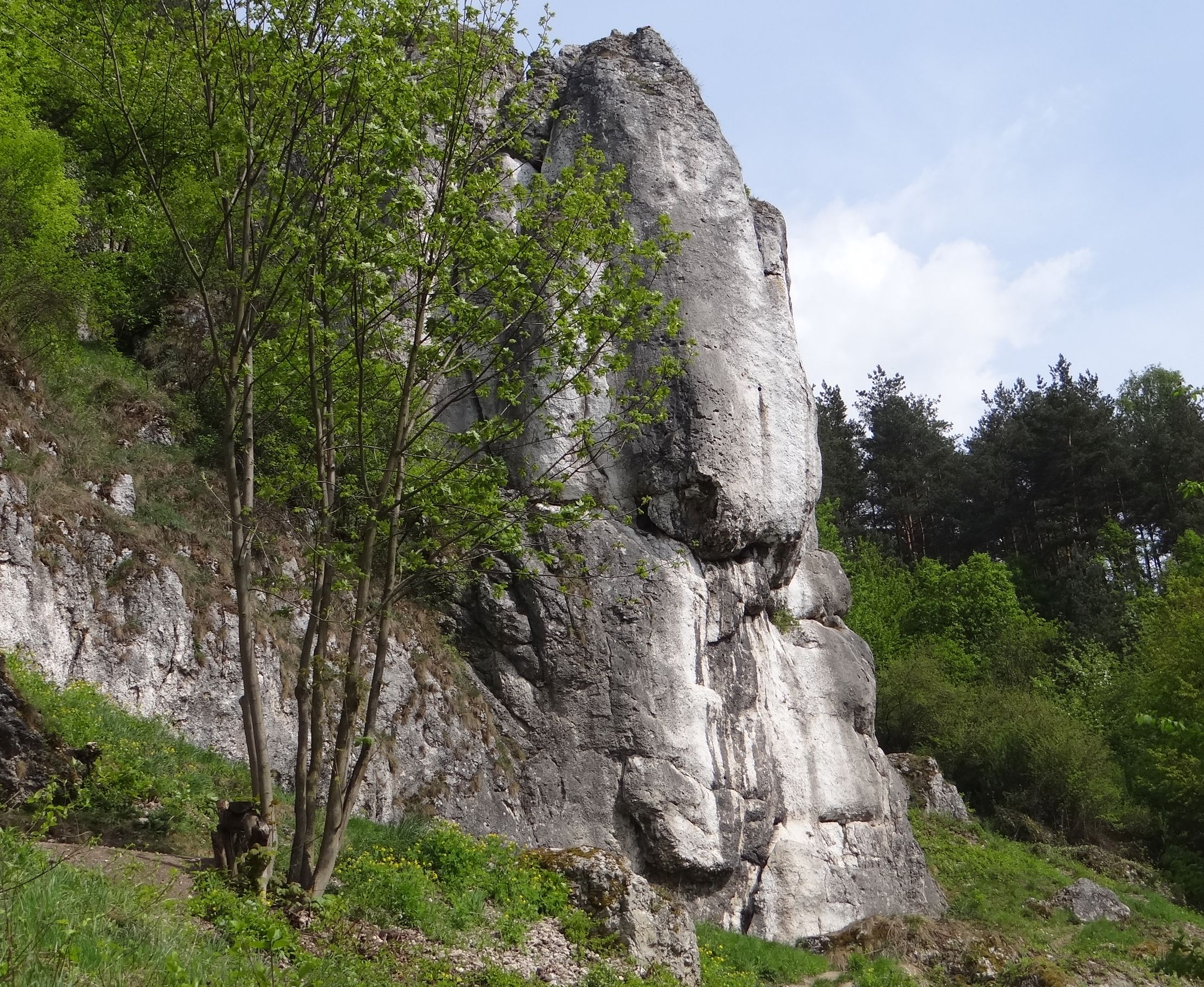 Zjazdowa Turnia w w Dolinie Kobylańskiej